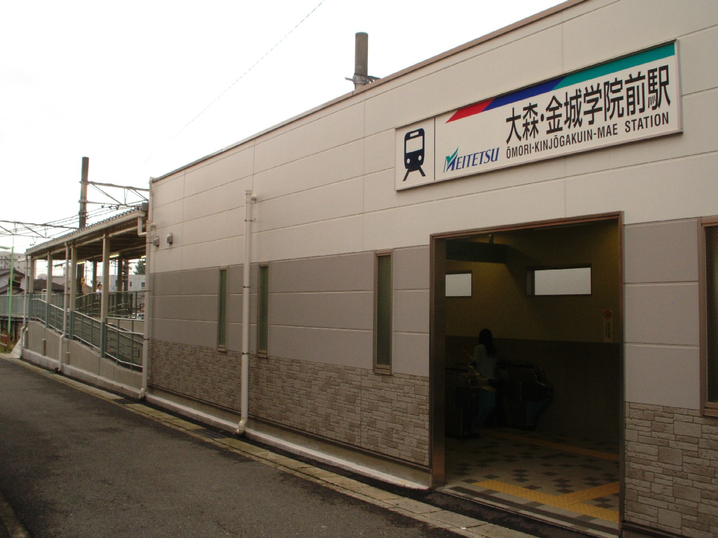 大森・金城学院前駅北口